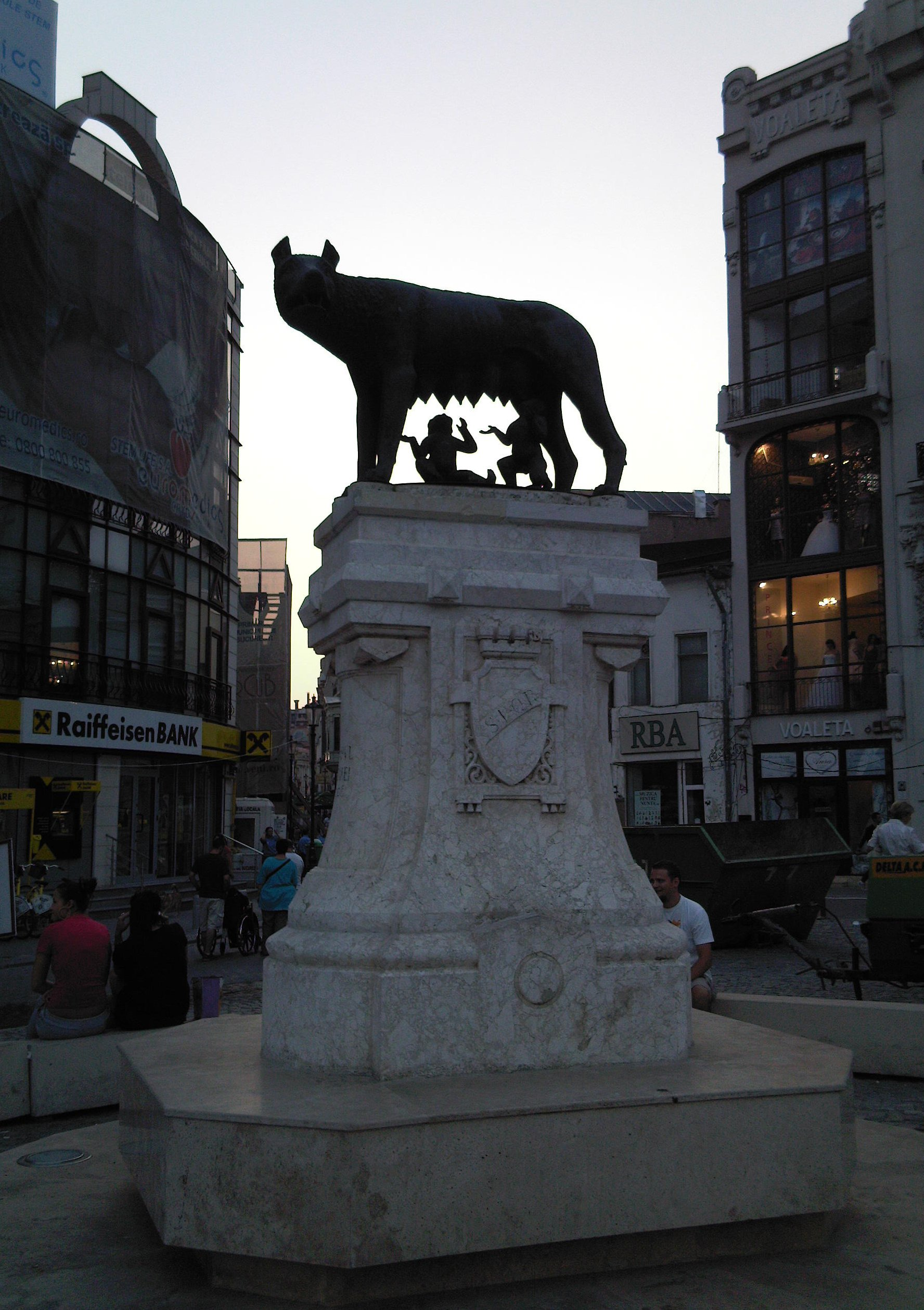 Lupoaica din Bucuresti